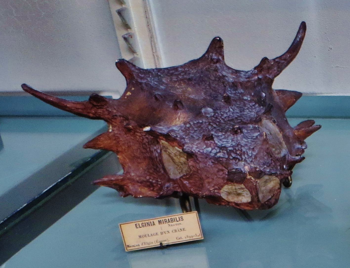 Fossil of Elginia, an extinct reptile- Took the picture at Musee d'Histoire Naturelle, Paris